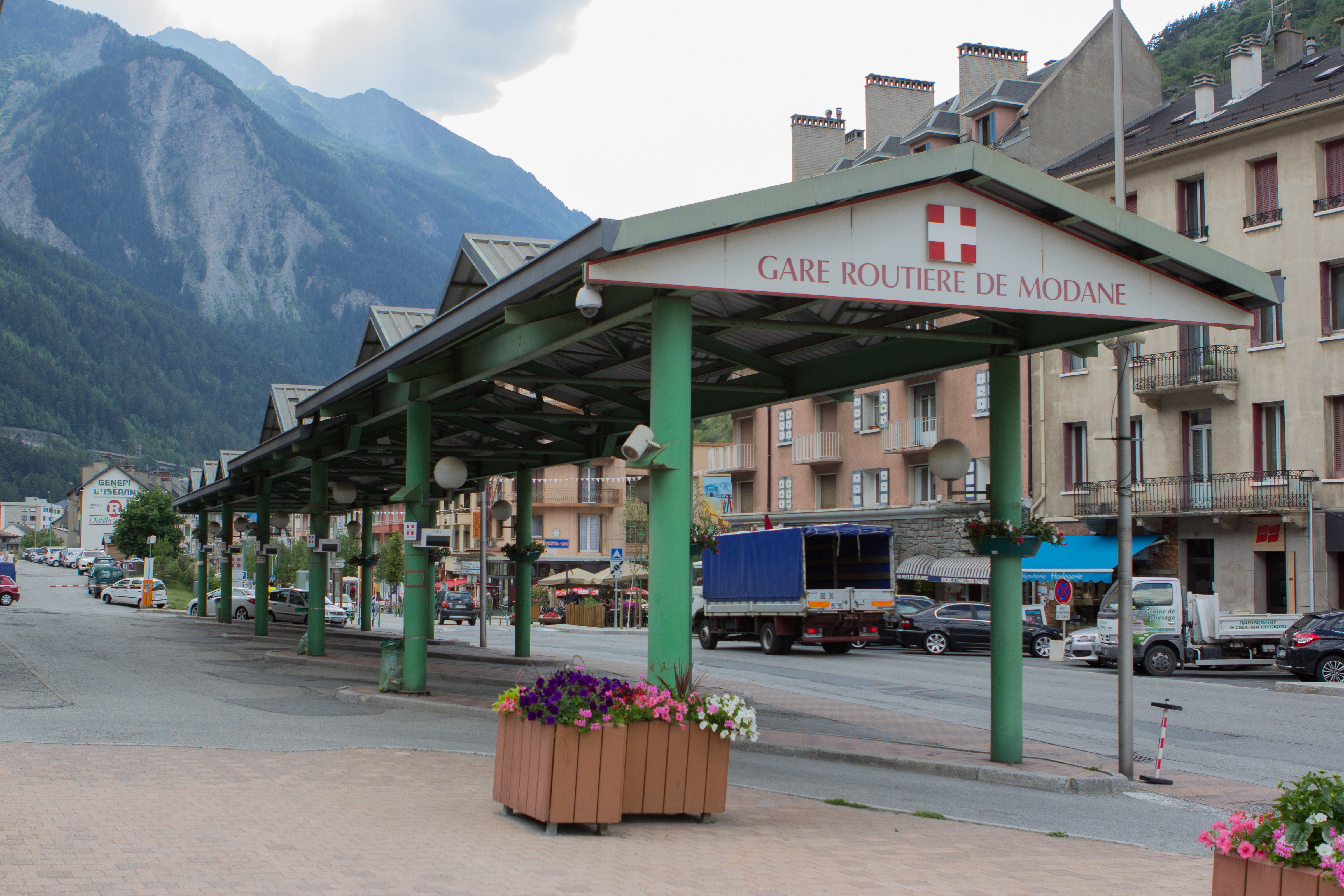 Gare de Modane, Modane, Savoie, France